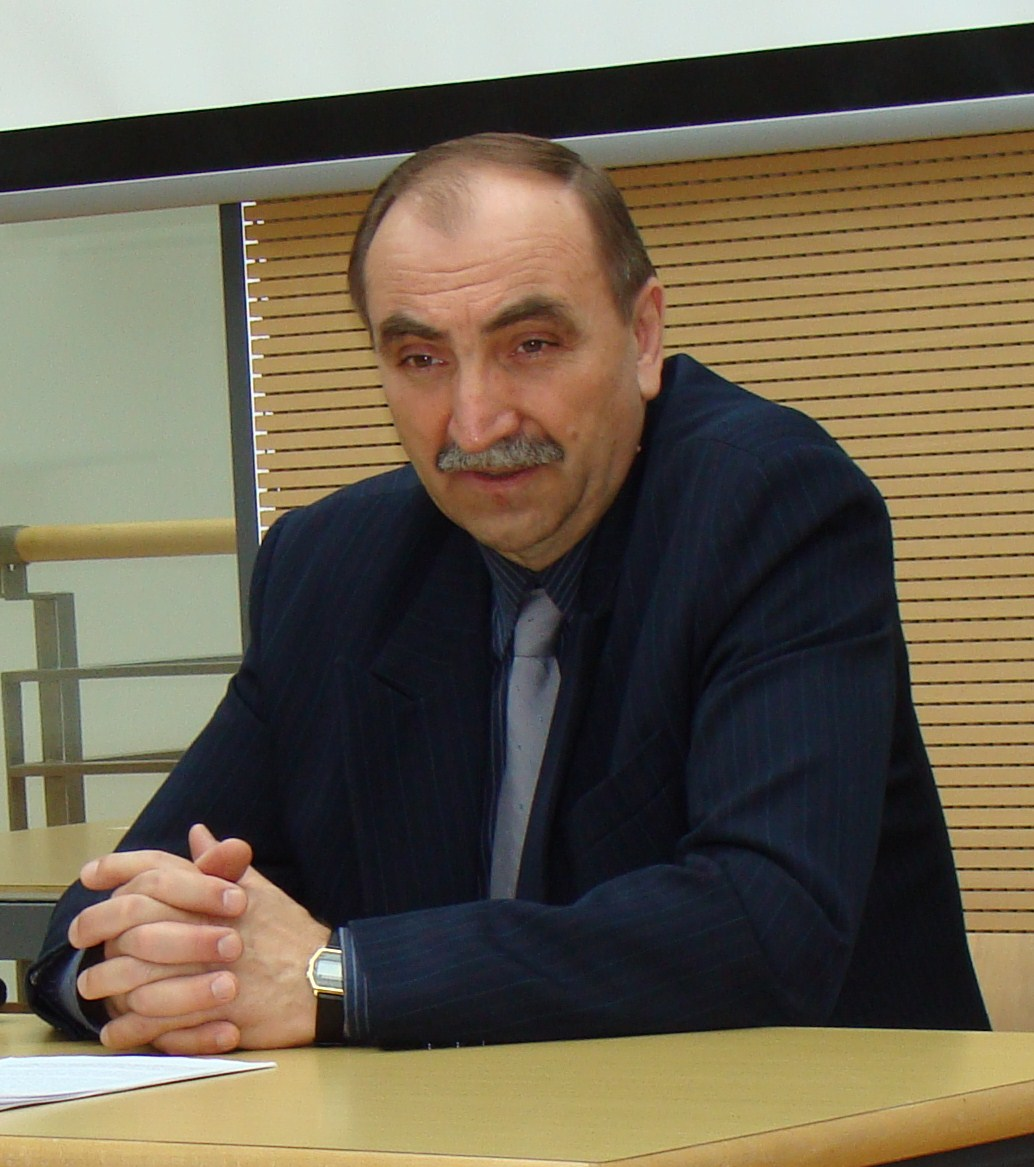 dr hab. Eugeniusz Mironowicz, polski historyk pochodzenia białoruskiego, podczas wykładu na Uniwersytecie Warszawskim dla stypendystów Programu Stypendialnego im. Konstantego Kalinowskiego z 6. naboru. 16 marca 2011 roku.